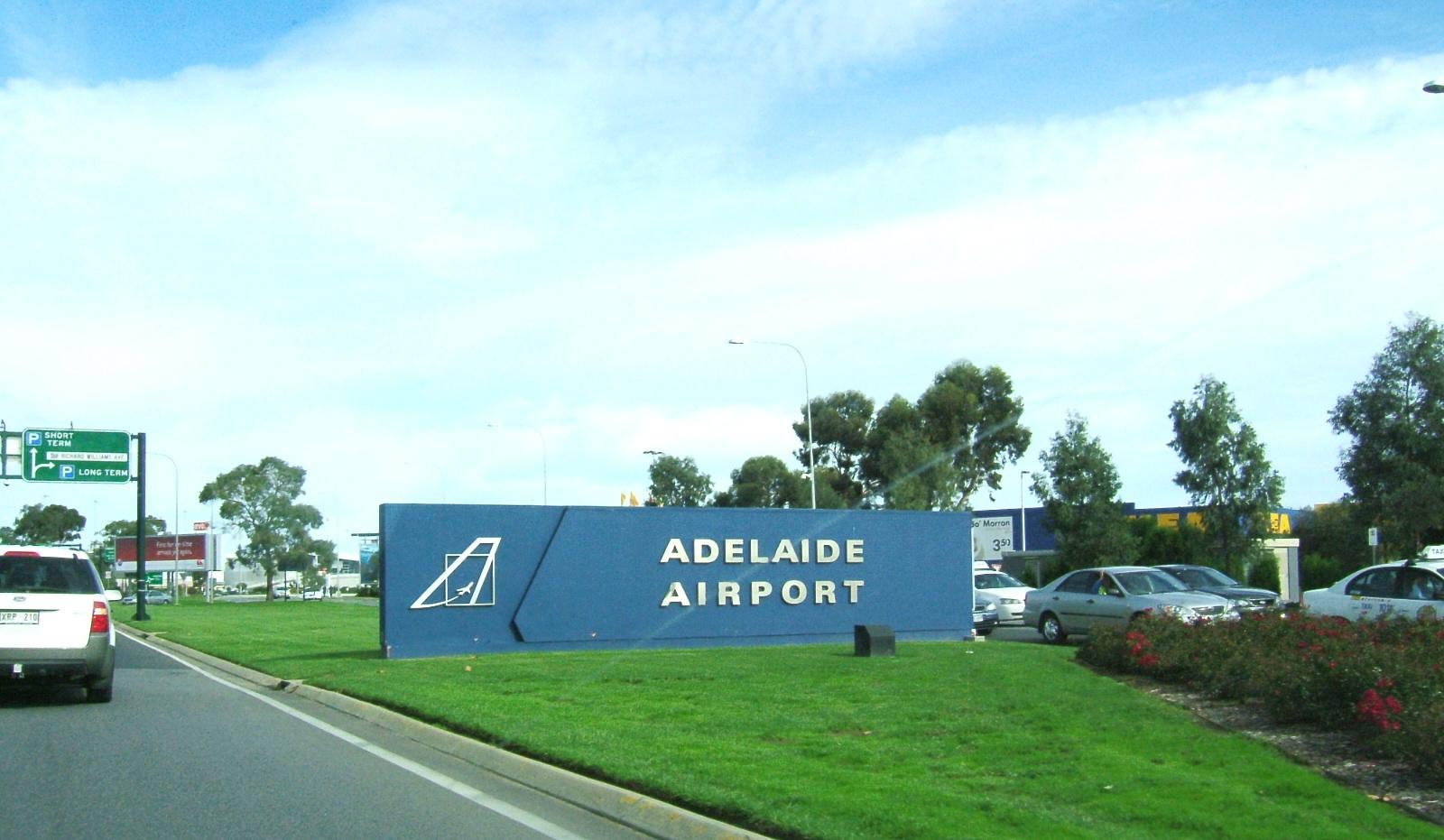 entrance, Adelaide Airport